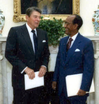 Abdullahi Ahmed Addow and Ronald Reagan